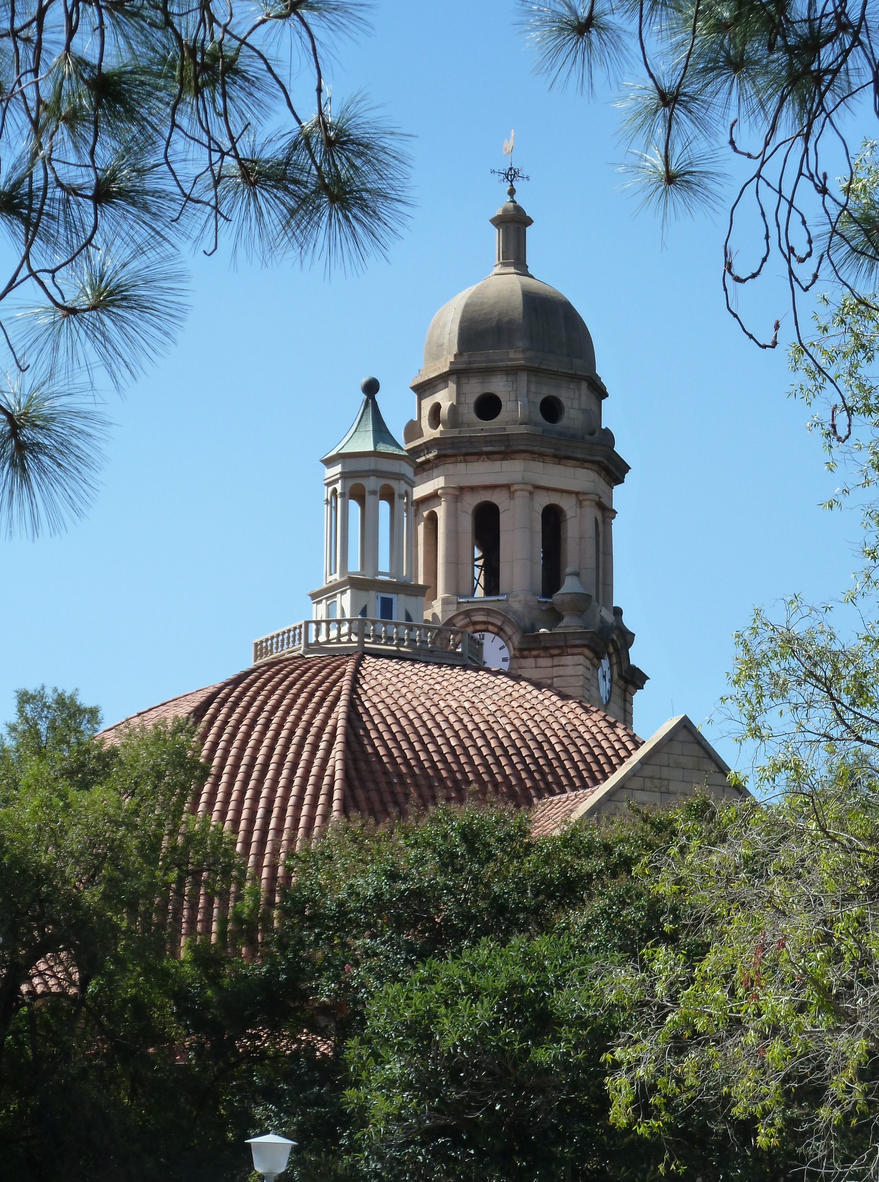 Kloktoring van die Ooskerk in Sunnyside, Pretoria